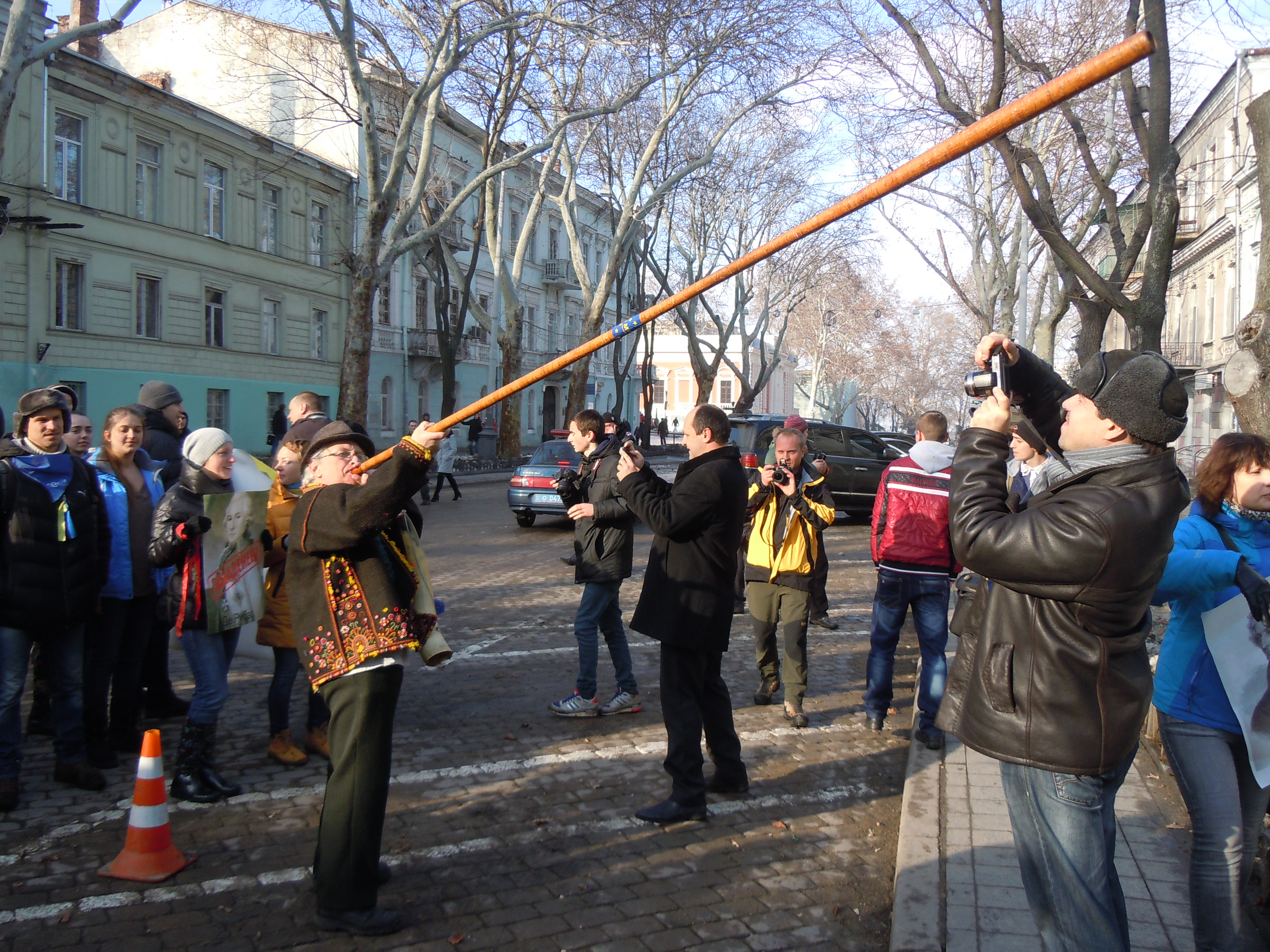 "Марш западенців", Одеса. Етномузикант зі Львова Любомир Кушлик (викладач кафедри фольклористики Львівського Національного університету ім. Івана Франка) грає на тримбиті під час пікету під будівлею Обласної прокуратури Одеської області на вилиці Пушкінській.